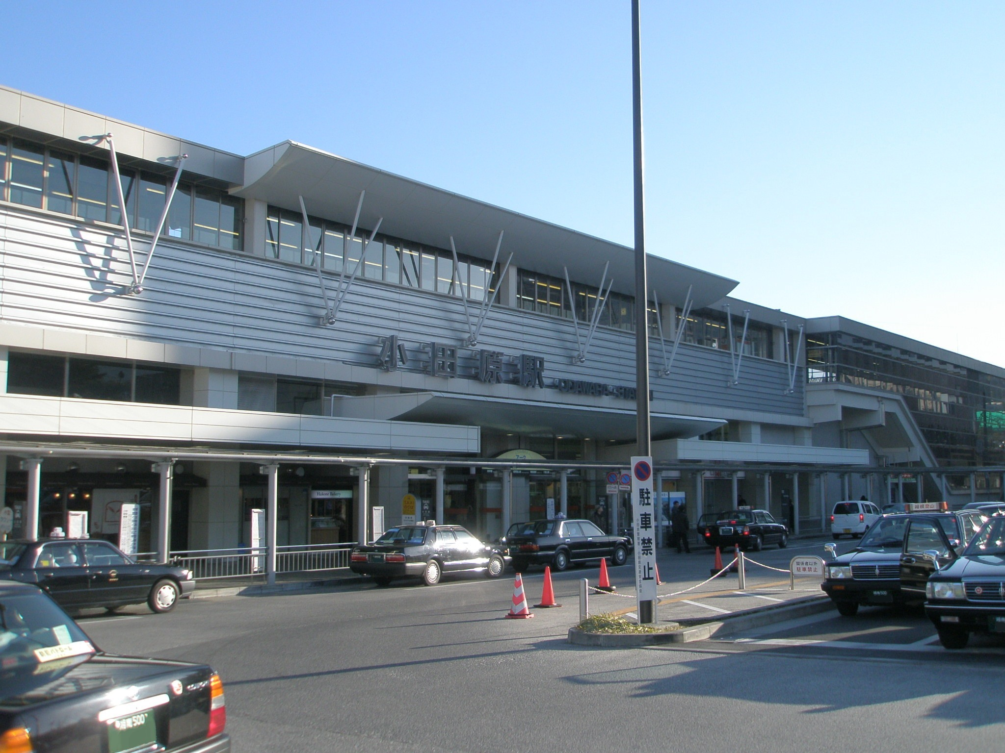 小田原駅西口